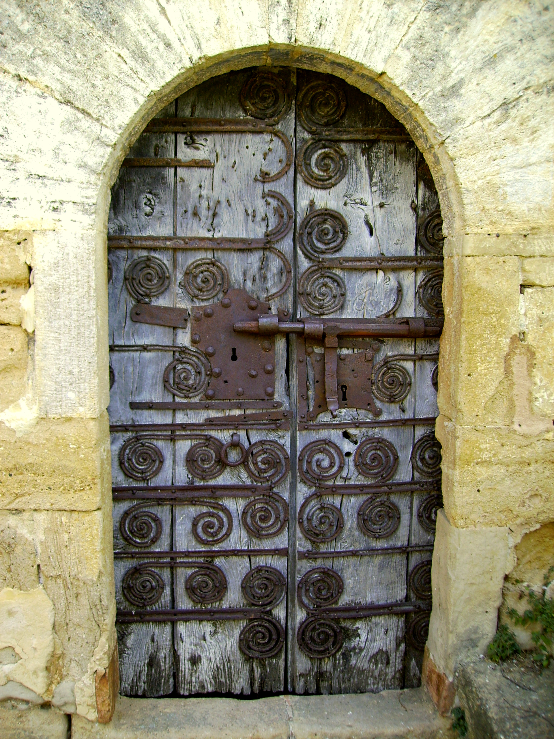 Església parroquial de Santa Eulàlia (Cornellà del Terri)